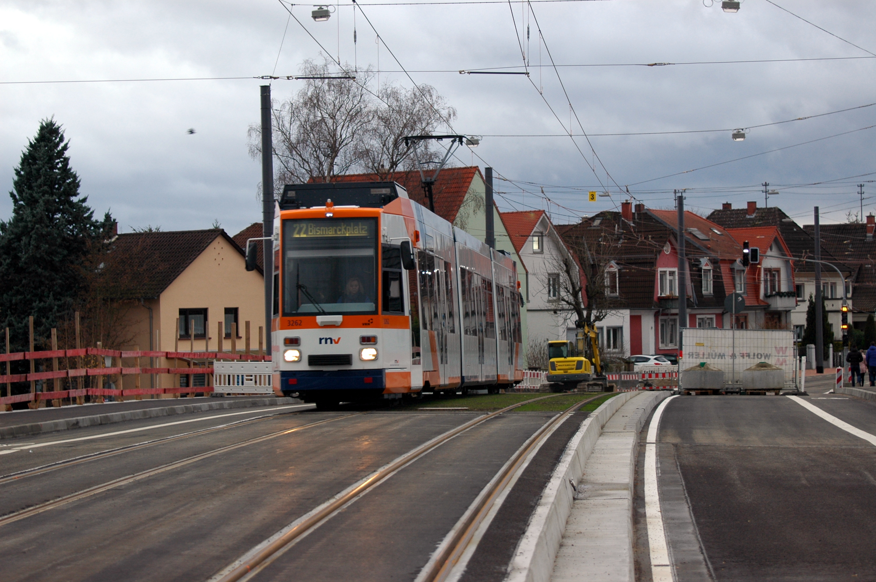 Tram transport in Heidelberg in 2018